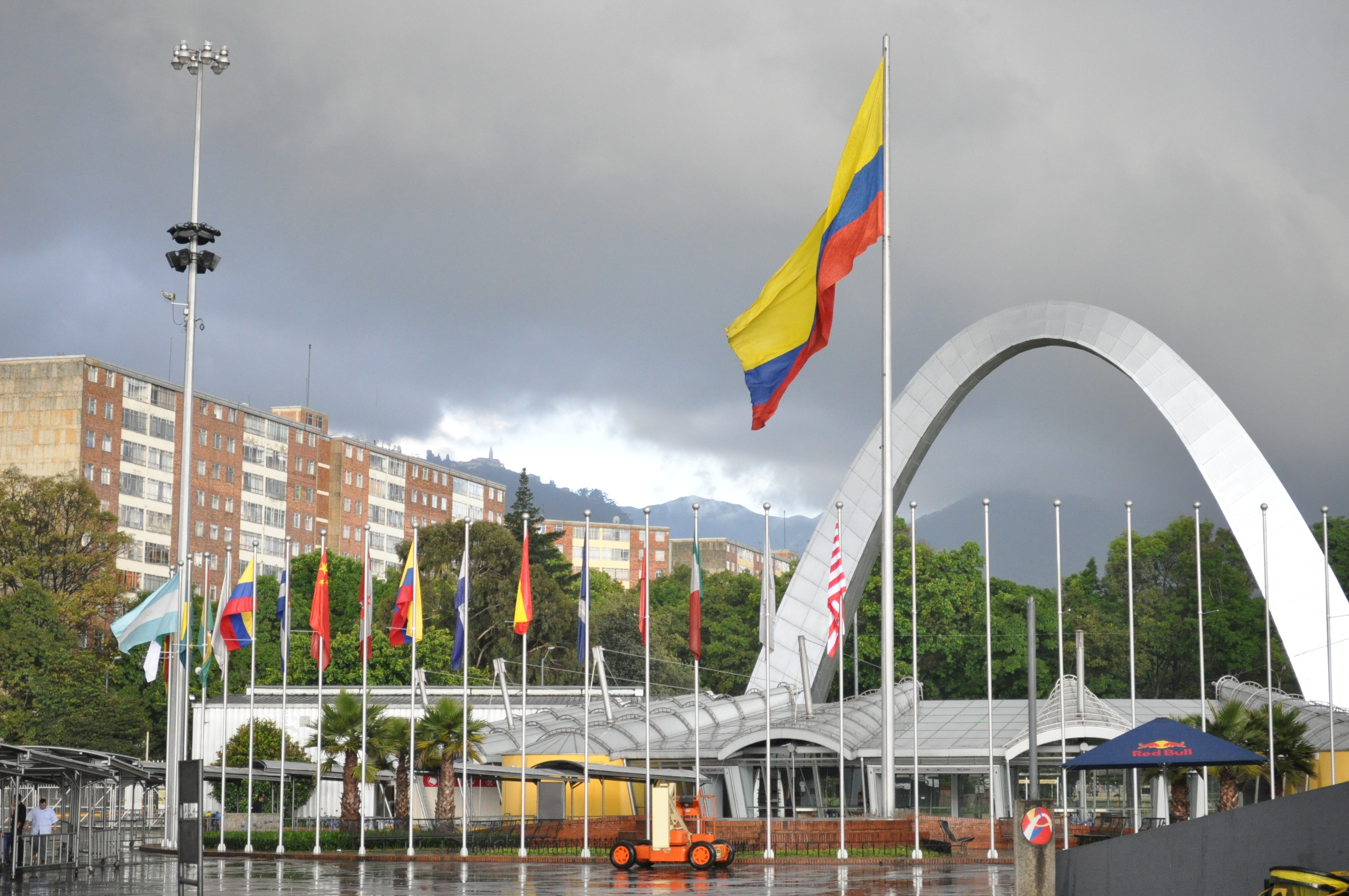 Día 3 de producción. Foto: Carlos Mario Rios